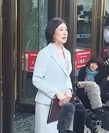 新宿ショールームにて。